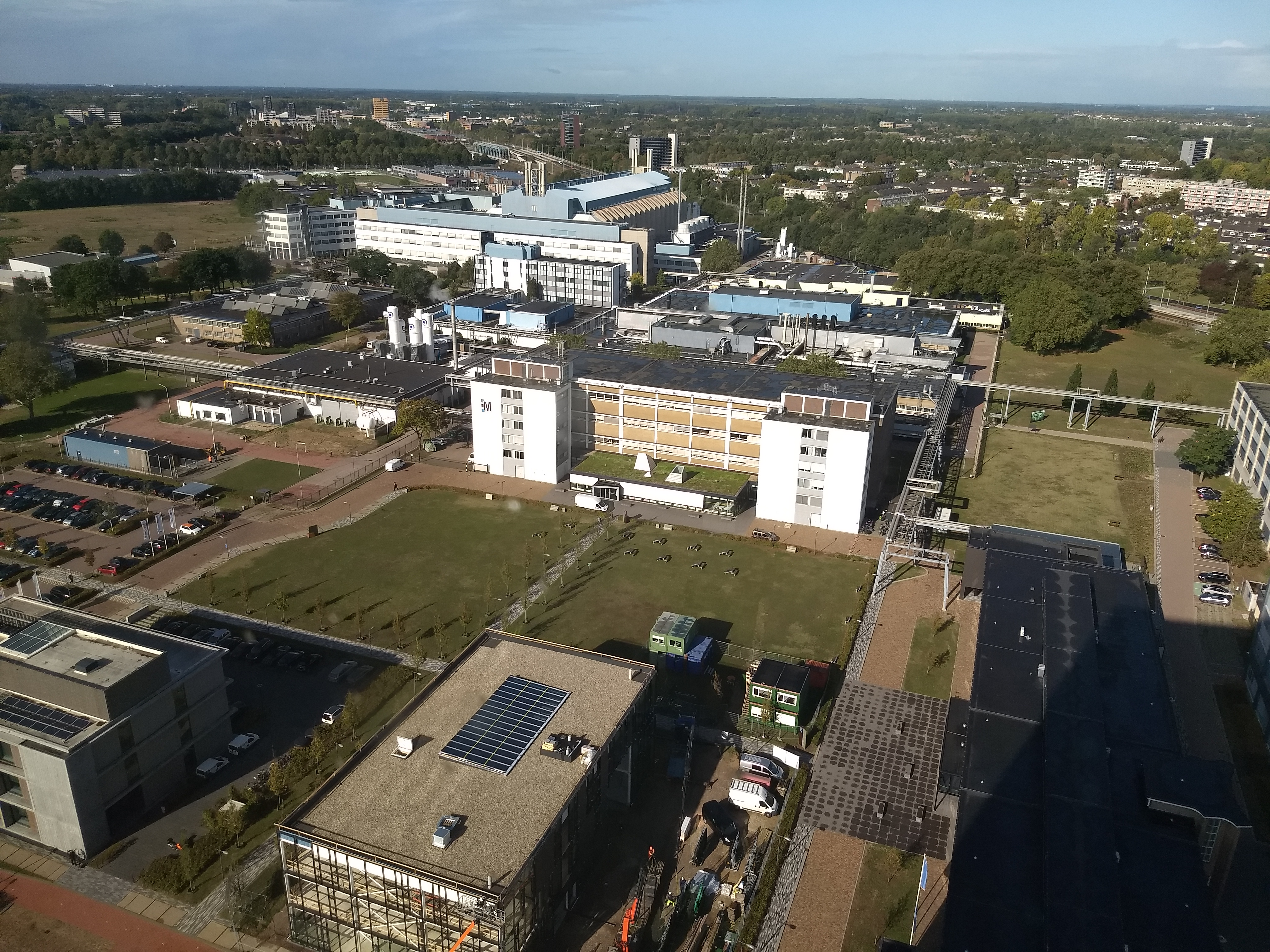 Luchtfoto van NTC